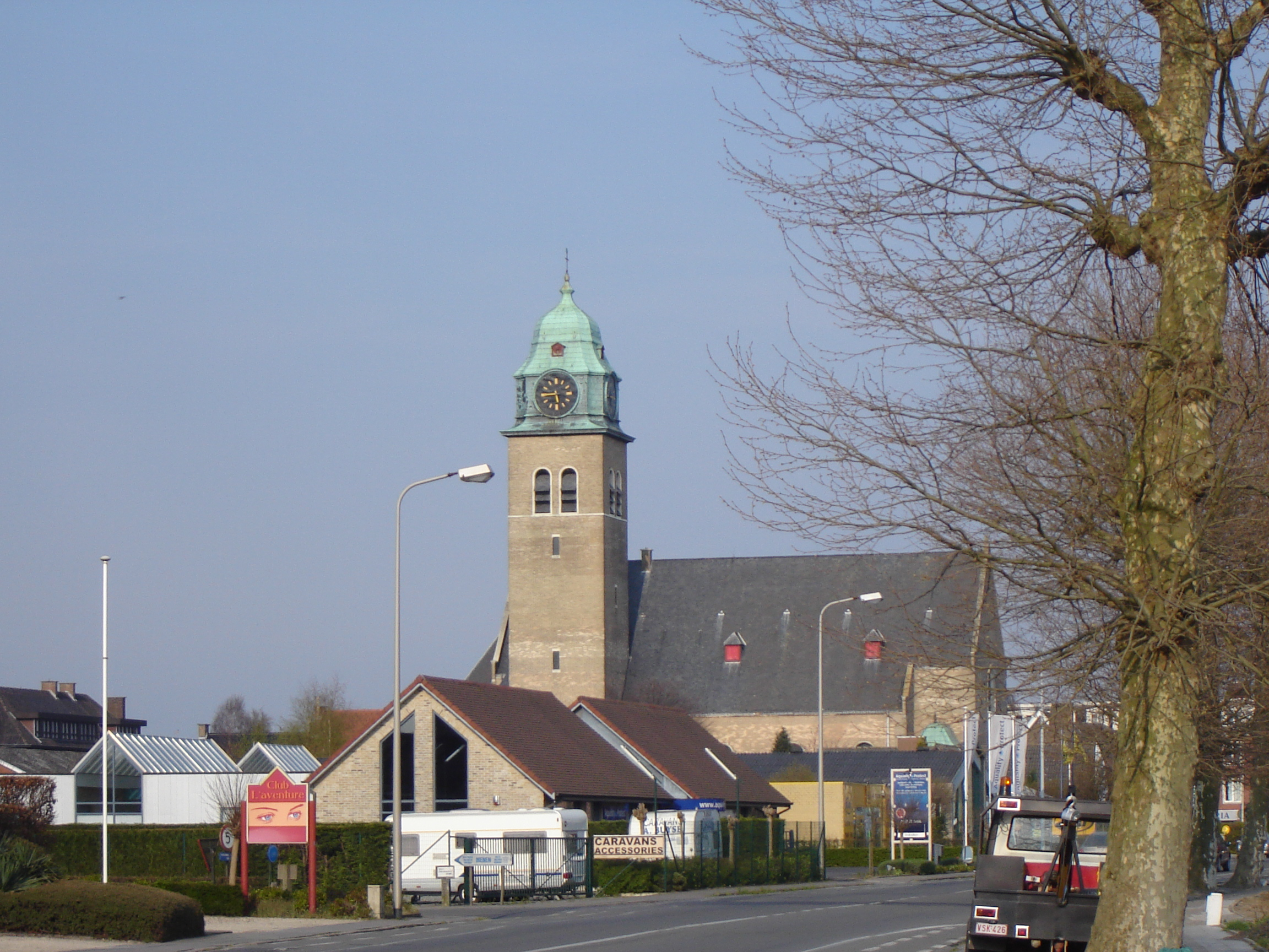 Wevelgem, West-Flanders, Belgium